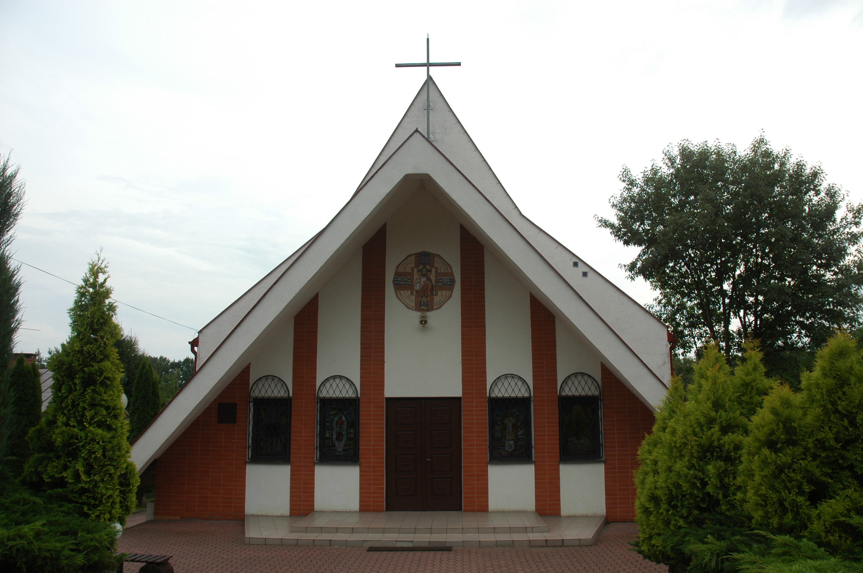 Kościół pw. Błogosławionej Karoliny Kózkówny Dziewicy i Męczennicy Białobrzegi ul. Wczasowa (powiat legionowski, gmina Nieporęt)